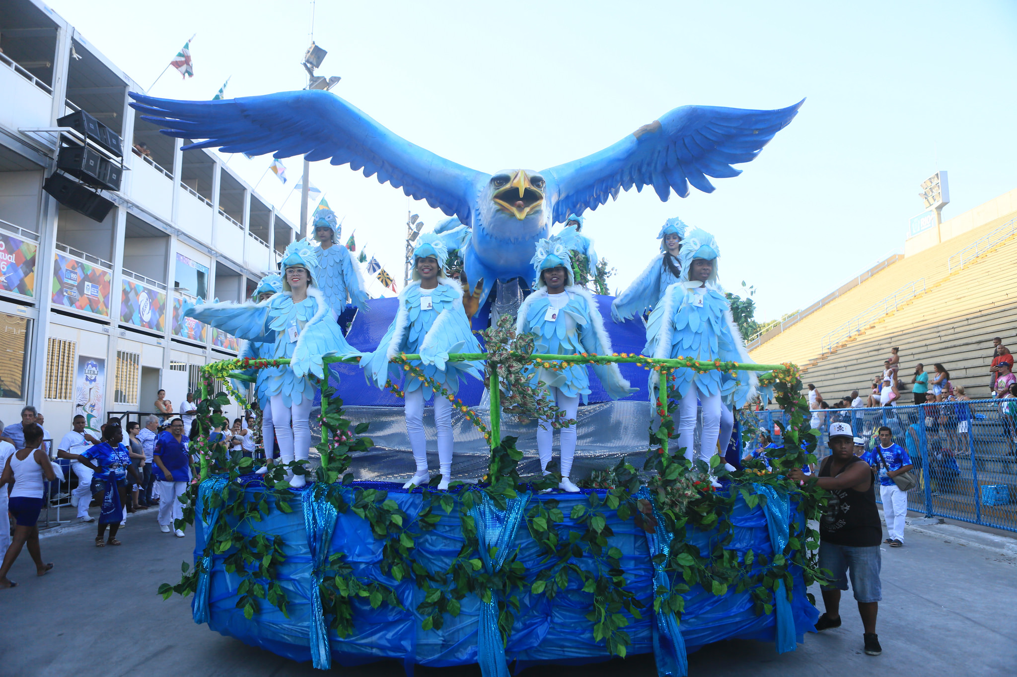 Rio de Janeiro - Pequenos sambistas fecham desfiles na Marquês de Sapucaí.